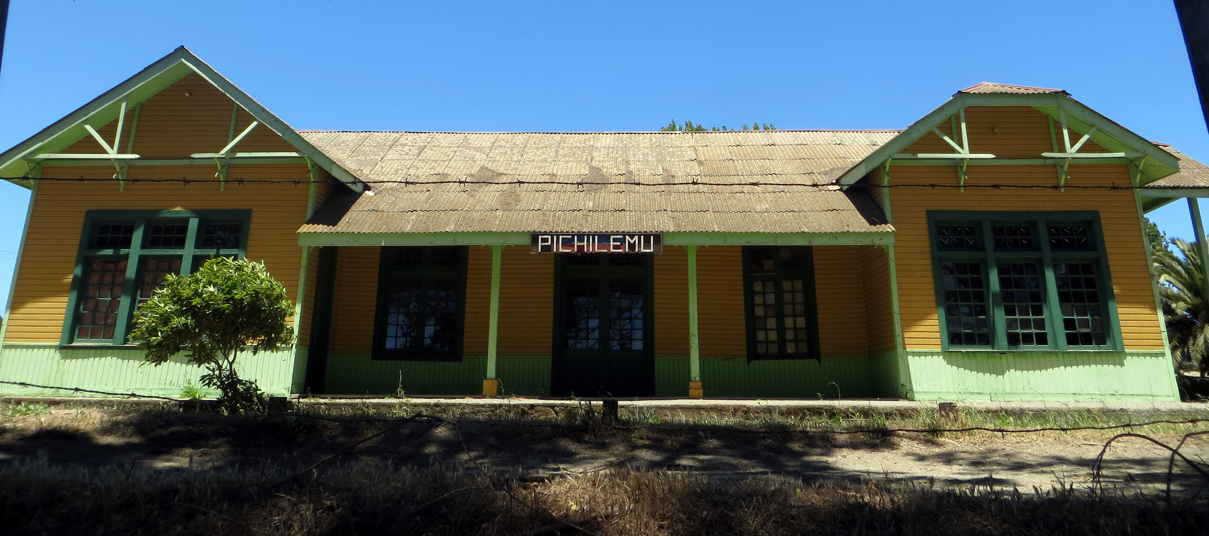 Ex estación de ferrocarriles de Pichilemu, región de O'Higgins. Monumento Histórico Nacional desde 1994. 9 de diciembre de 2013. Fotografías por Diego Grez Cañete.